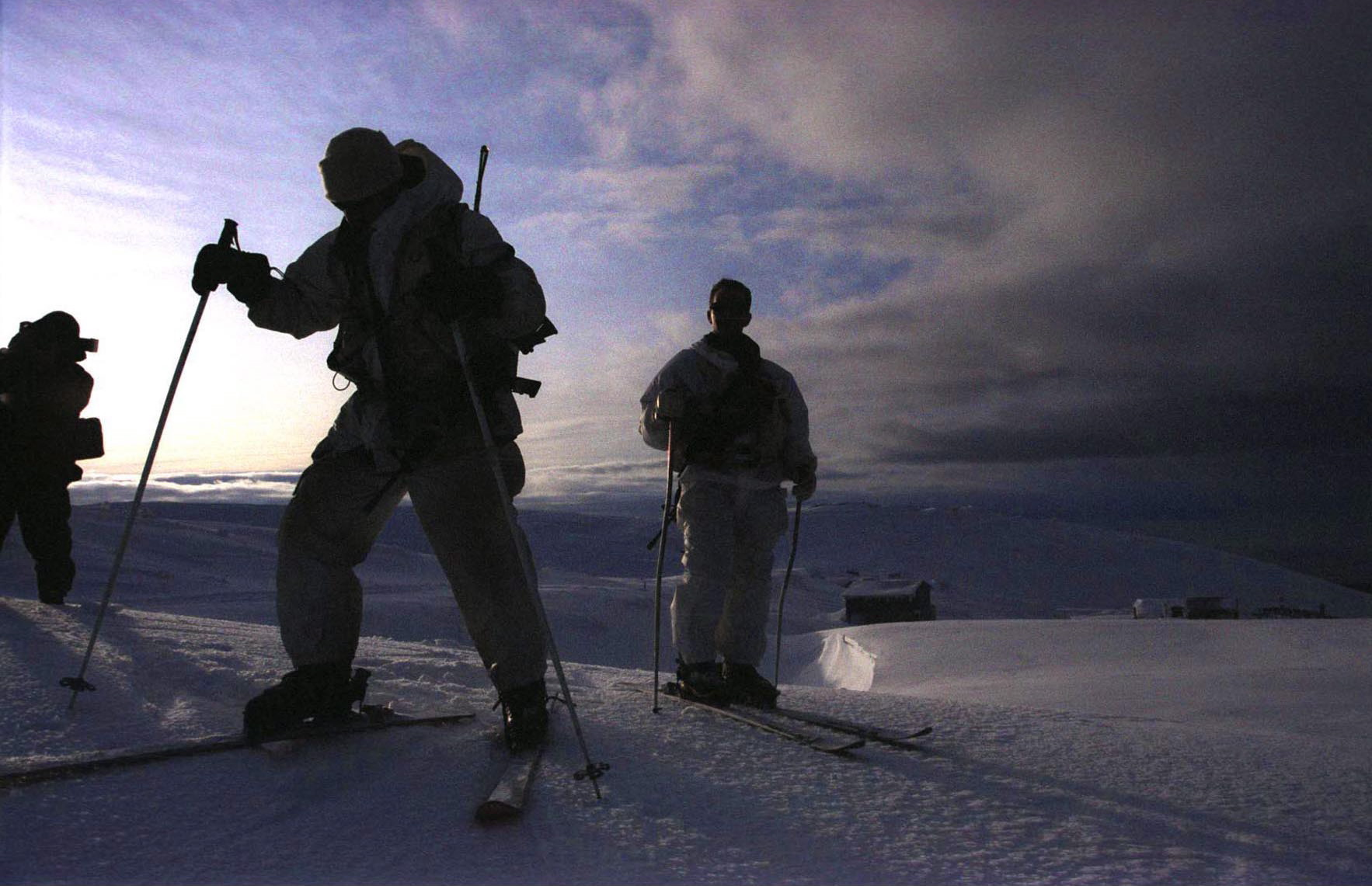 January 24, 2004. The elite Alpine Unit undergoes training in Mt. Hermon. The Alpine Unit is responsible for the protection of the Mount Hermon region and its civilians. The unit takes part in clearing the snow paths to allow people to continue to operate under these difficult conditions. יחידת האלפיניסטים המובחרת בתקופת אימונים בחרמון. יחידת האלפיניסטים אחראית על הגנת גזרת החרמון ותושביה, והן עוזרת במאמץ פינוי השלג בכדי לאפשר מעבר חופשי ופעילות רציפה בתנאי מזג אוויר קשים.